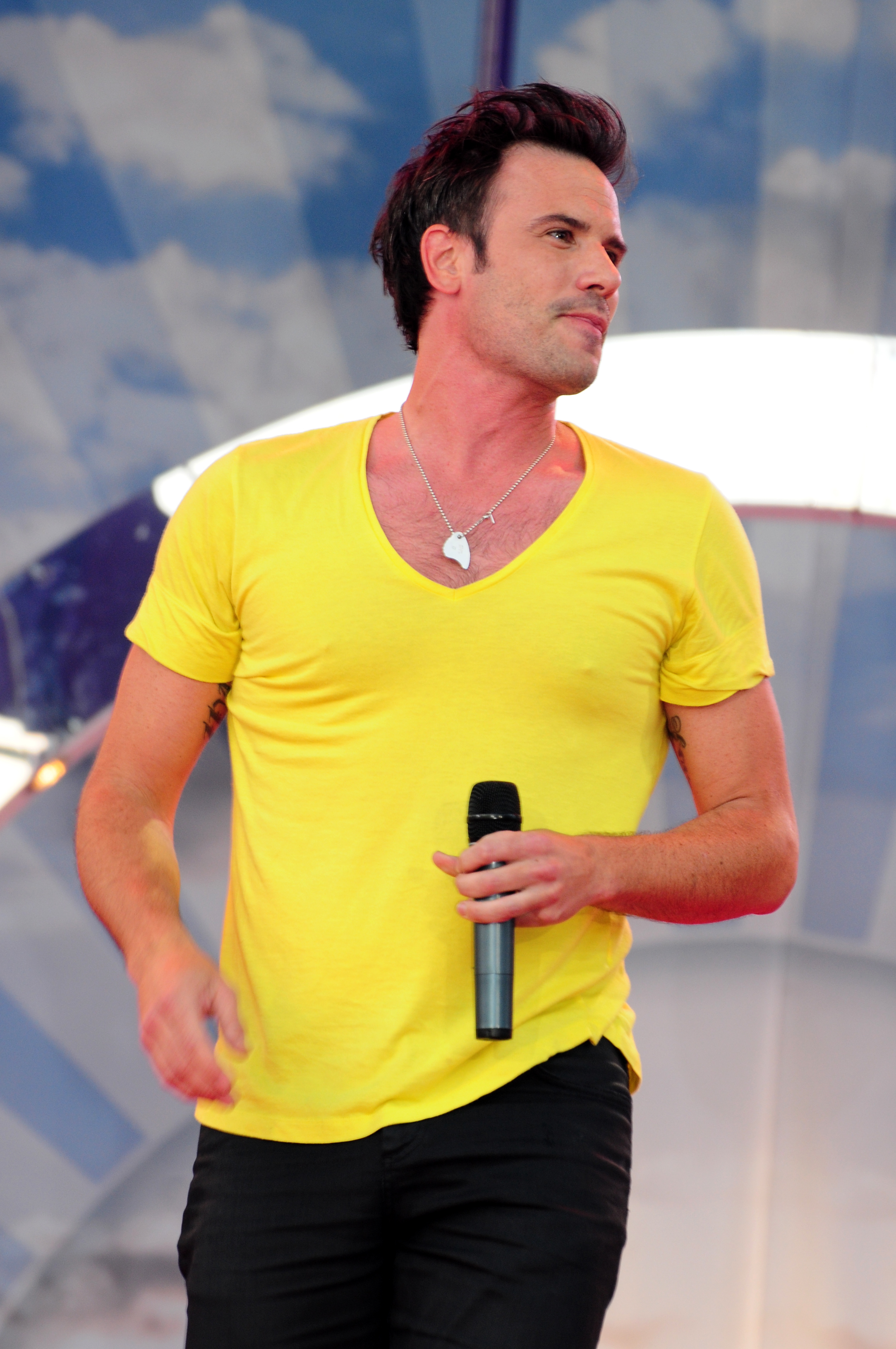 Martin Stenmarck på Sommarkrysset 2010